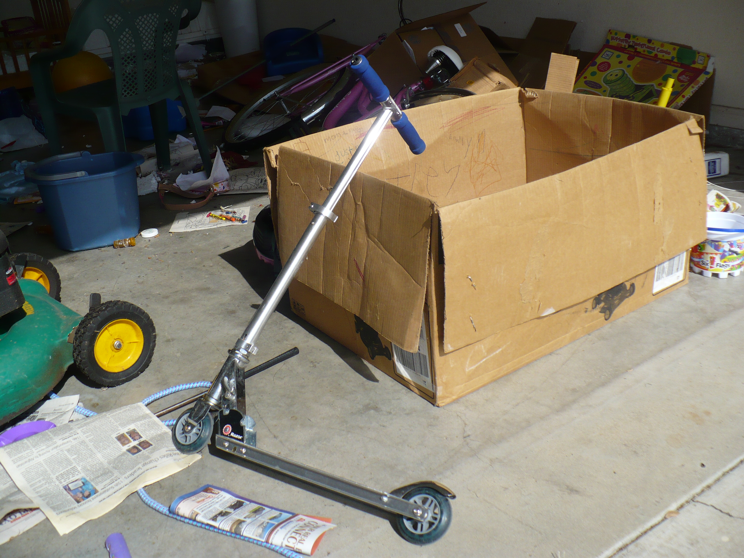 Razor A-model 2nd generation